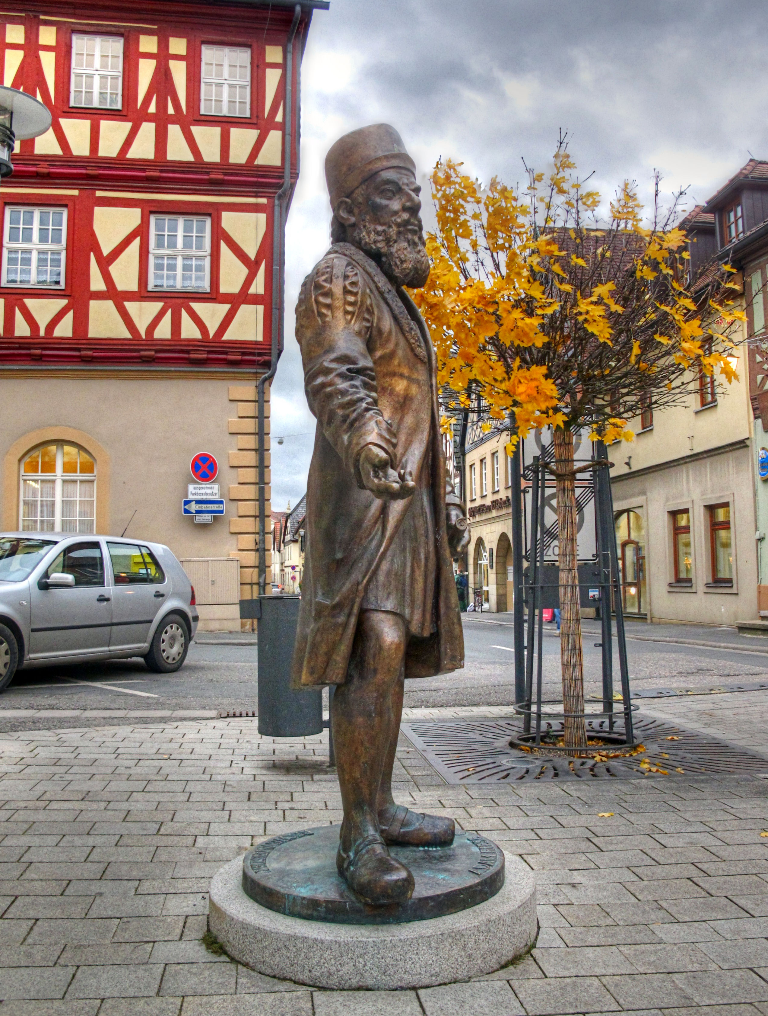 Deutschland, Bayern, Bad Staffelstein, überlebensgroßes Adam-Ries(e)-Bronze-Denkmal in der Bahnhofstraße im Ortszentrum, enthüllt zum 450. Todestag des Rechenmeisters im November 2009, gestaltet vom Bildhauer Andreas Krämmer